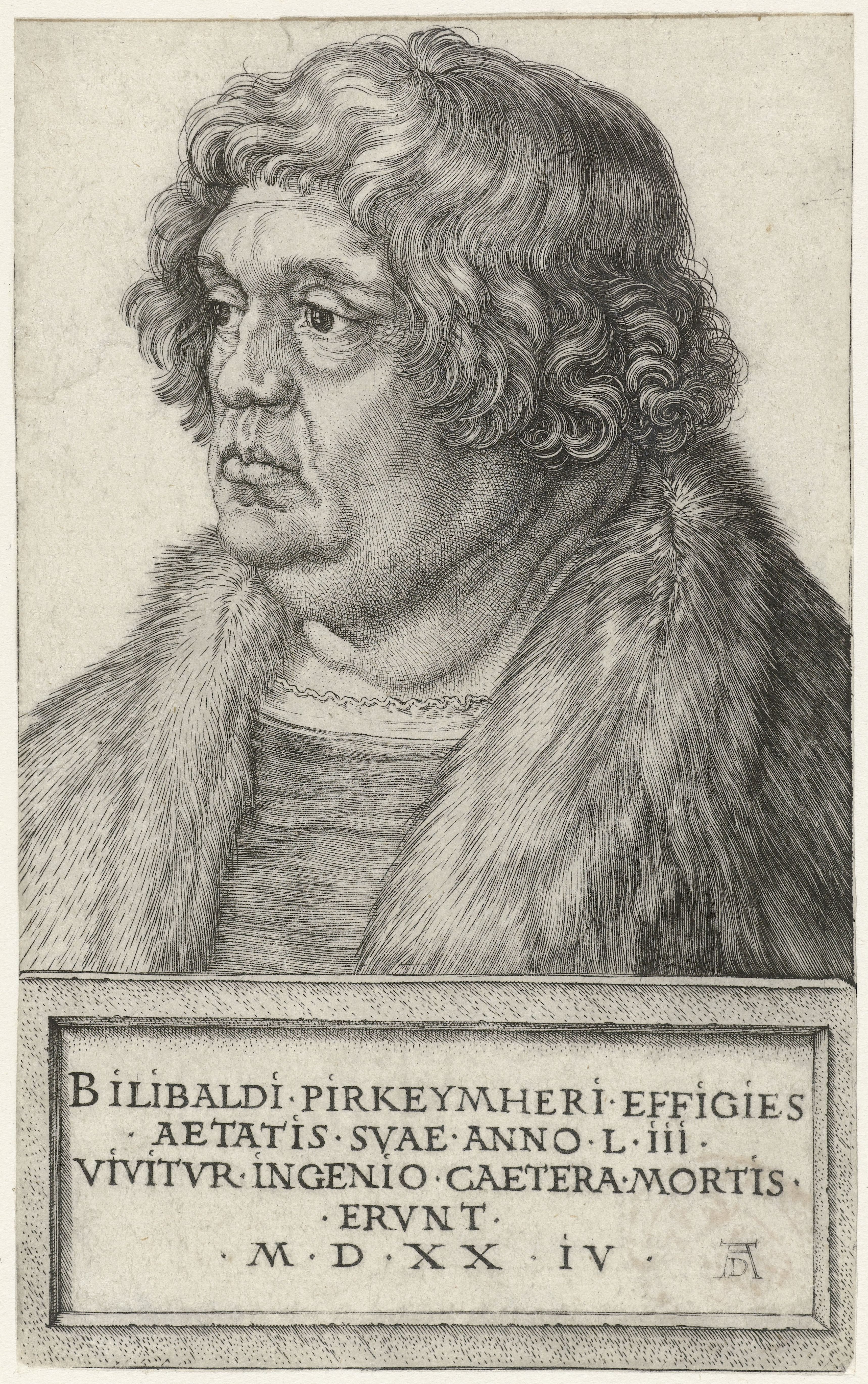 IdentificatieTitel(s): Portret van Willibald PirckheimerObjecttype: prent Objectnummer: RP-P-OB-1280Catalogusreferentie: Bartsch 106Meder 103-1c(2)Opschriften / Merken: verzamelaarsmerk, verso linksonder, gestempeld: Lugt 240Omschrijving: Portret (buste) van Willibald Pirckheimer, min of meer op de linkerzijde gezien, met bontmantel. Onderin een tablet met Latijnse tekst.VervaardigingVervaardiger: prentmaker: Albrecht Dürer (vermeld op object)Plaats vervaardiging: NeurenbergDatering: 1524Fysieke kenmerken: gravureMateriaal: papier Techniek: graveren (drukprocedé)Afmetingen: blad: h 181 mm × b 112 mmToelichtingMogelijk had deze prent oorspronkelijk het inventarisnummer RP-P-1877-A-42 (zie opmerking aldaar). Klinkert, C.OnderwerpWat: historical person (PIRCKHEIMER, WILLLIBALD) - historical person (PIRCKHEIMER, WILLLIBALD) portrayed aloneWie: Willibald PirckheimerVerwerving en rechtenVerwerving: overdracht van beheer 1816Copyright: Publiek domein